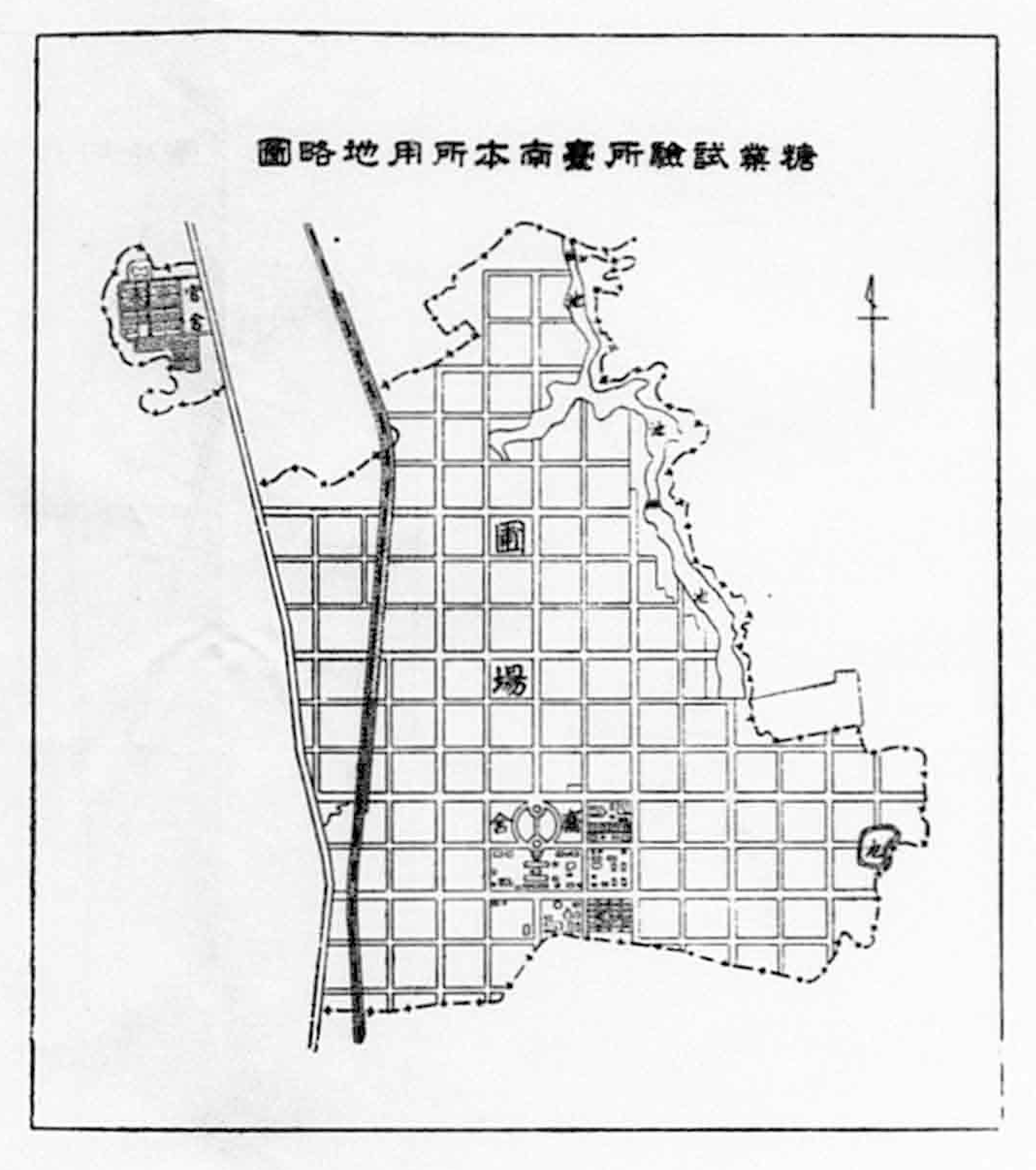 糖業試驗所本所位於台南市竹篙厝，途中可見其廳舍、圃場、官舍分布。